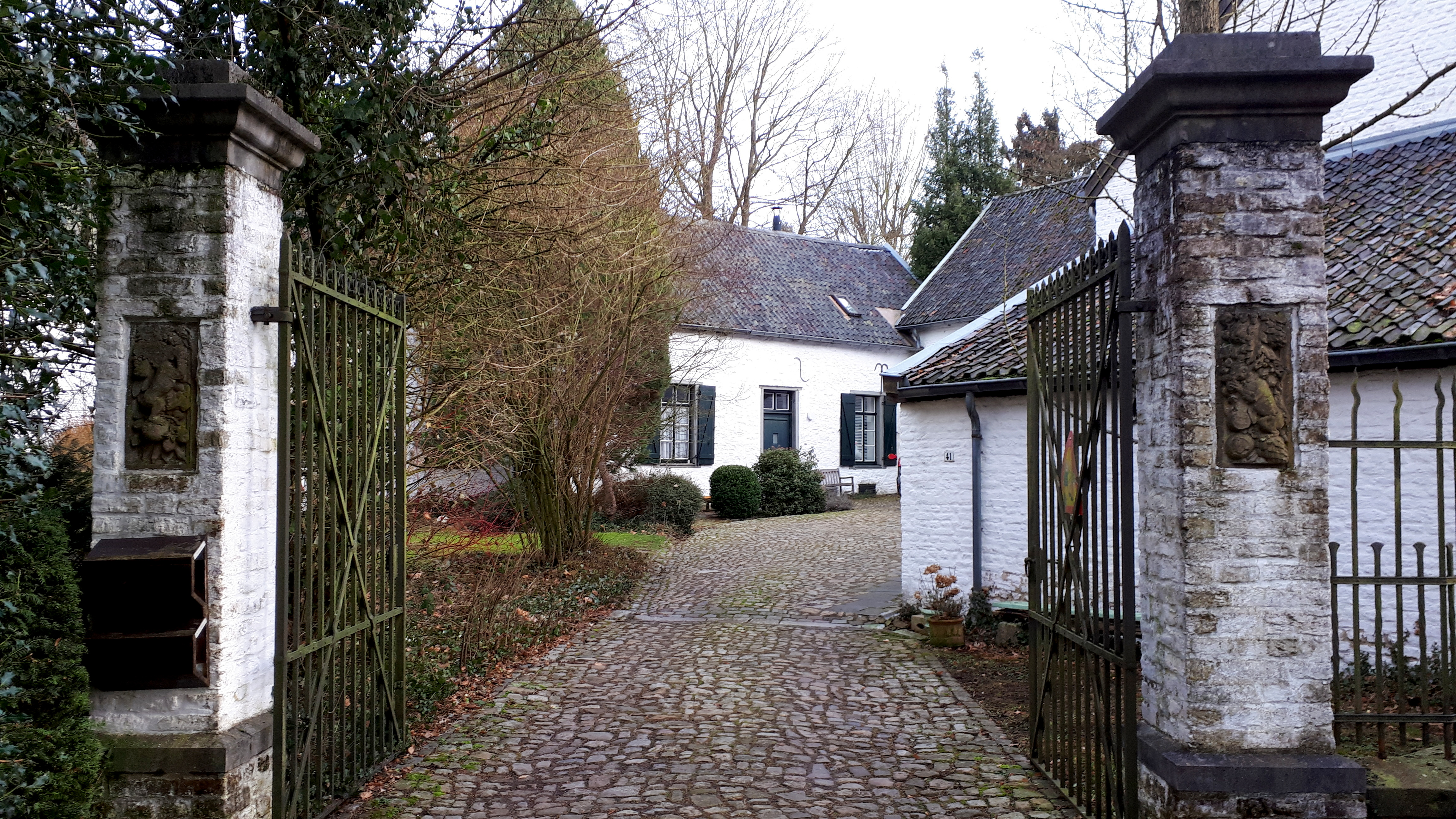 Gut Diepenbenden - Aachen; Baudenkmal in Aache-Mitte; Geburtshaus von Alfred Rethel; Landgut, Mühlenbetrieb; Fabrikstätte für Salmiak und Berliner Blau; Erstbau um 161; Neubau um 1820